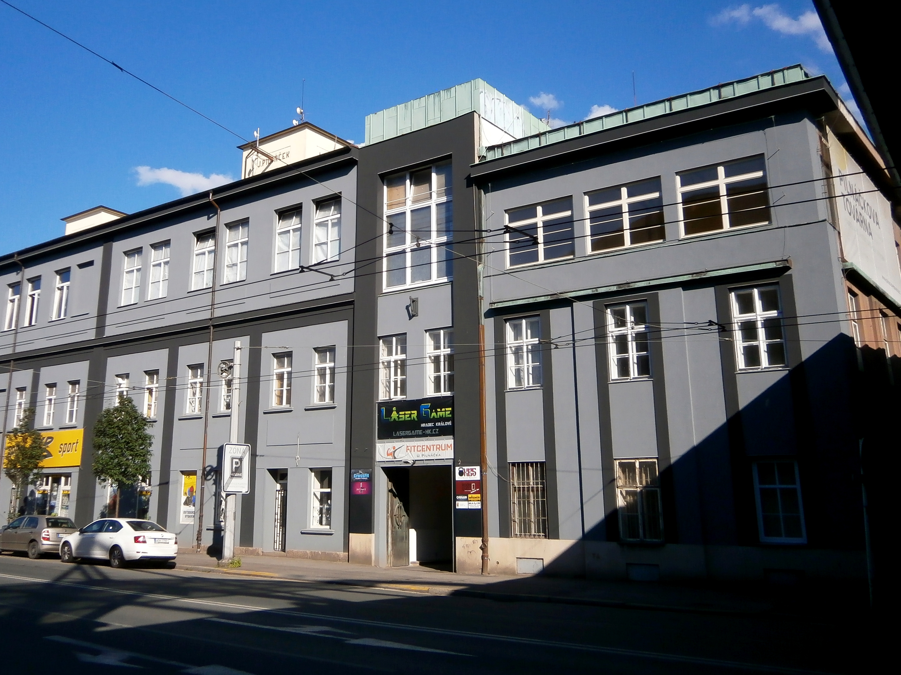 Pilnáčkova továrna (Hradec Králové)